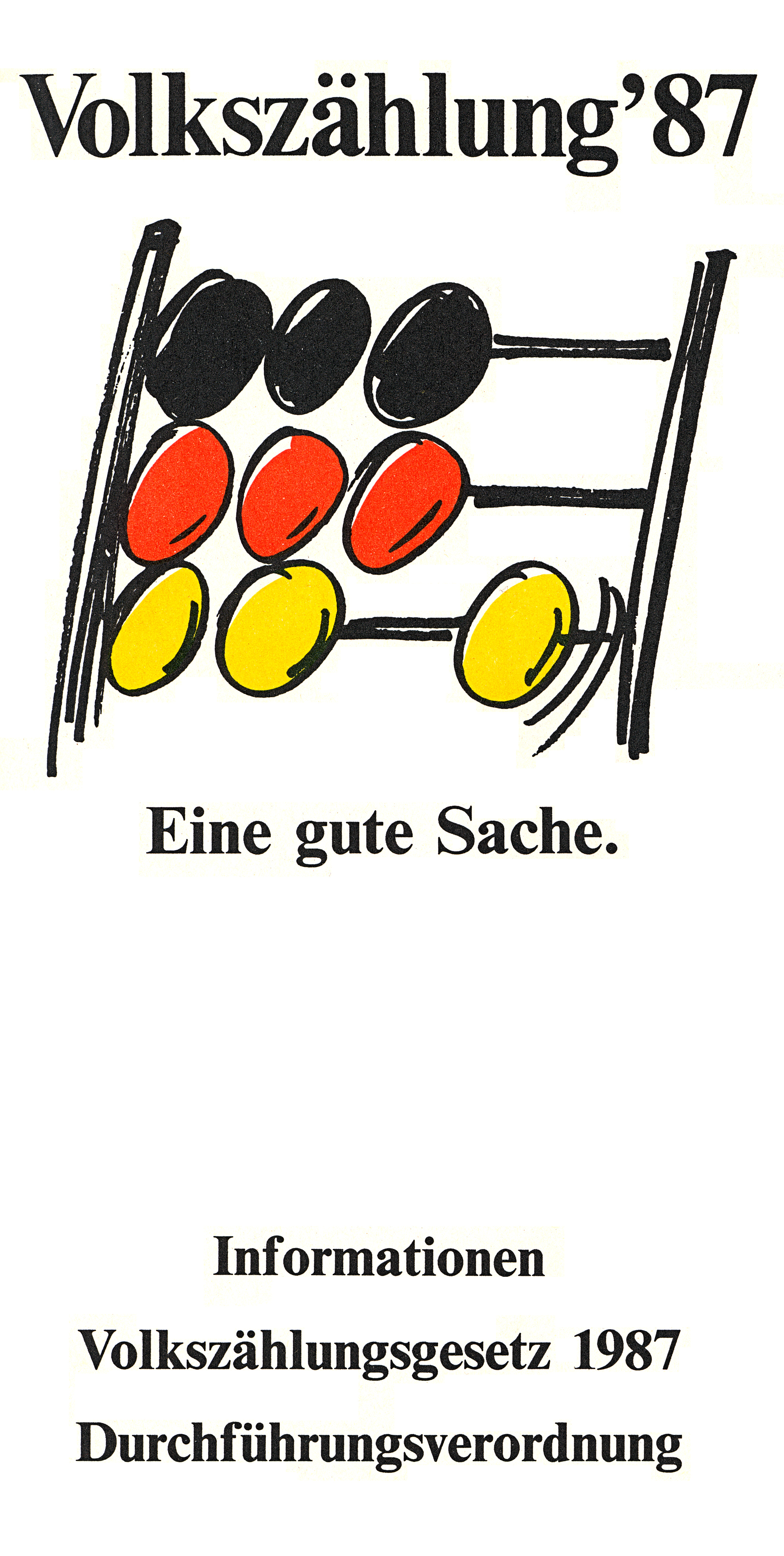 Titelblatt der Infobroschüre zur Volkszählung 1987, Bayerisches Landesamt für Statistik und Datenverarbeitung, enthält die Durchführungsverordung zum Volkszählunggesetz von 1987 sowie einen erläuternden Teil